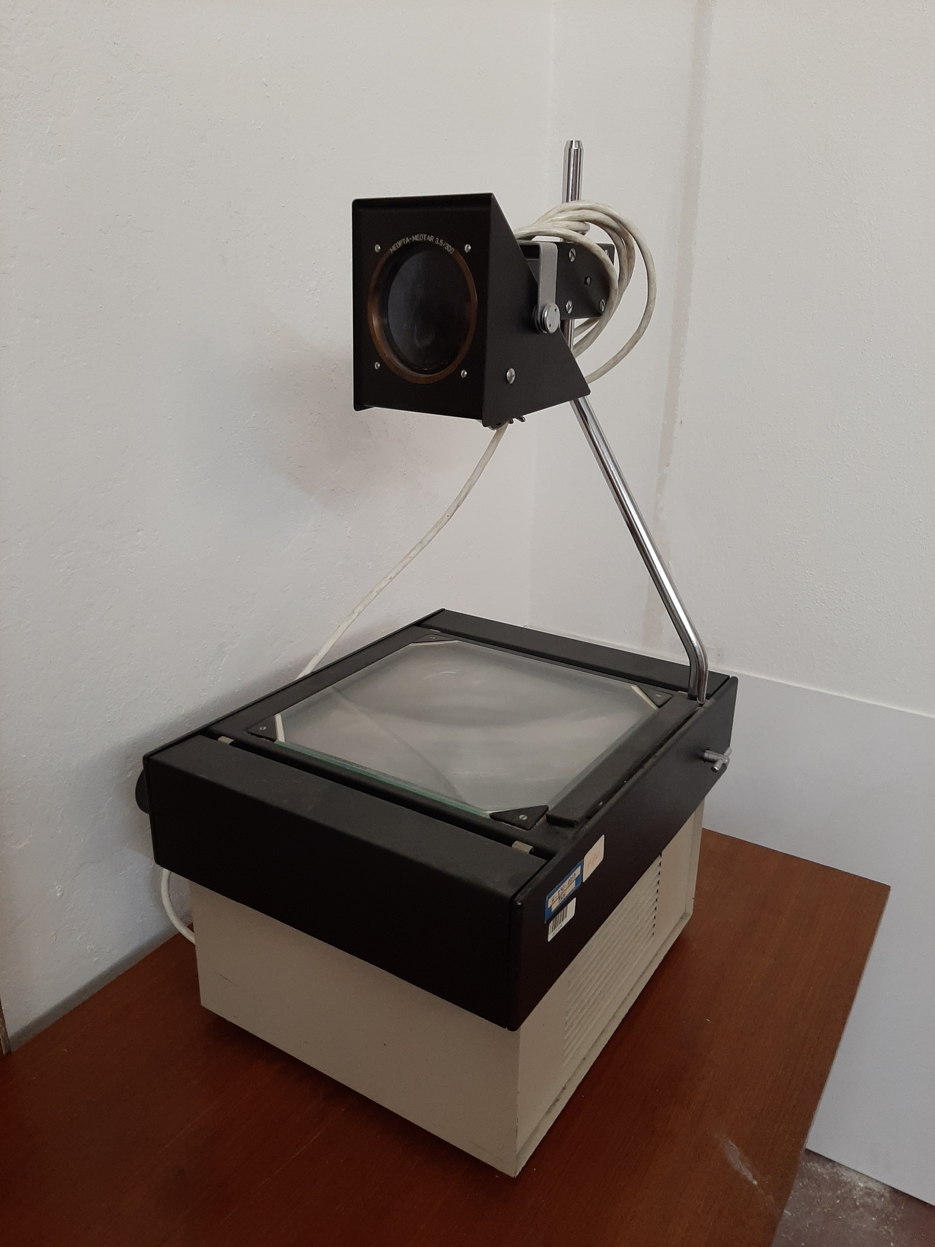 Zpětný projektor na pražském Strahovském stadionu.